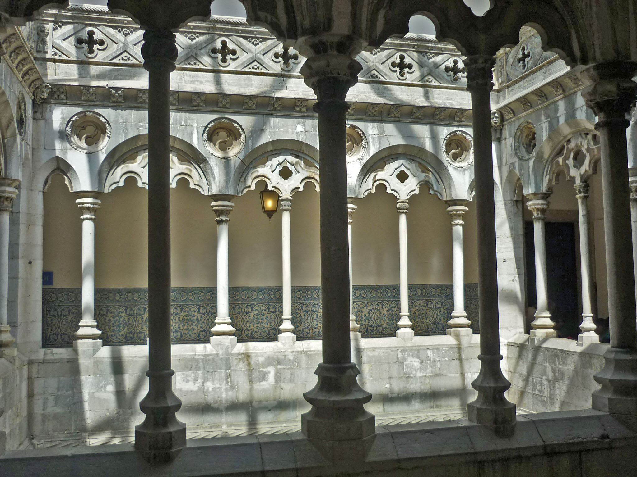 Manuelinischer Kreuzgang im Azulejo-Nationalmuseum (Museu Nacional do Azulejo) im ehem. Muttergottes-Kloster (Convento Madre de Deus) in Lissabon